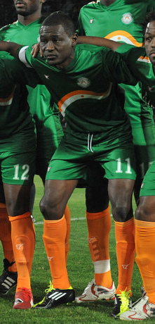 équipe du Niger en 2011